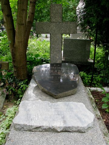 Włodzimierz and Barbara Ledóchowski’s grave